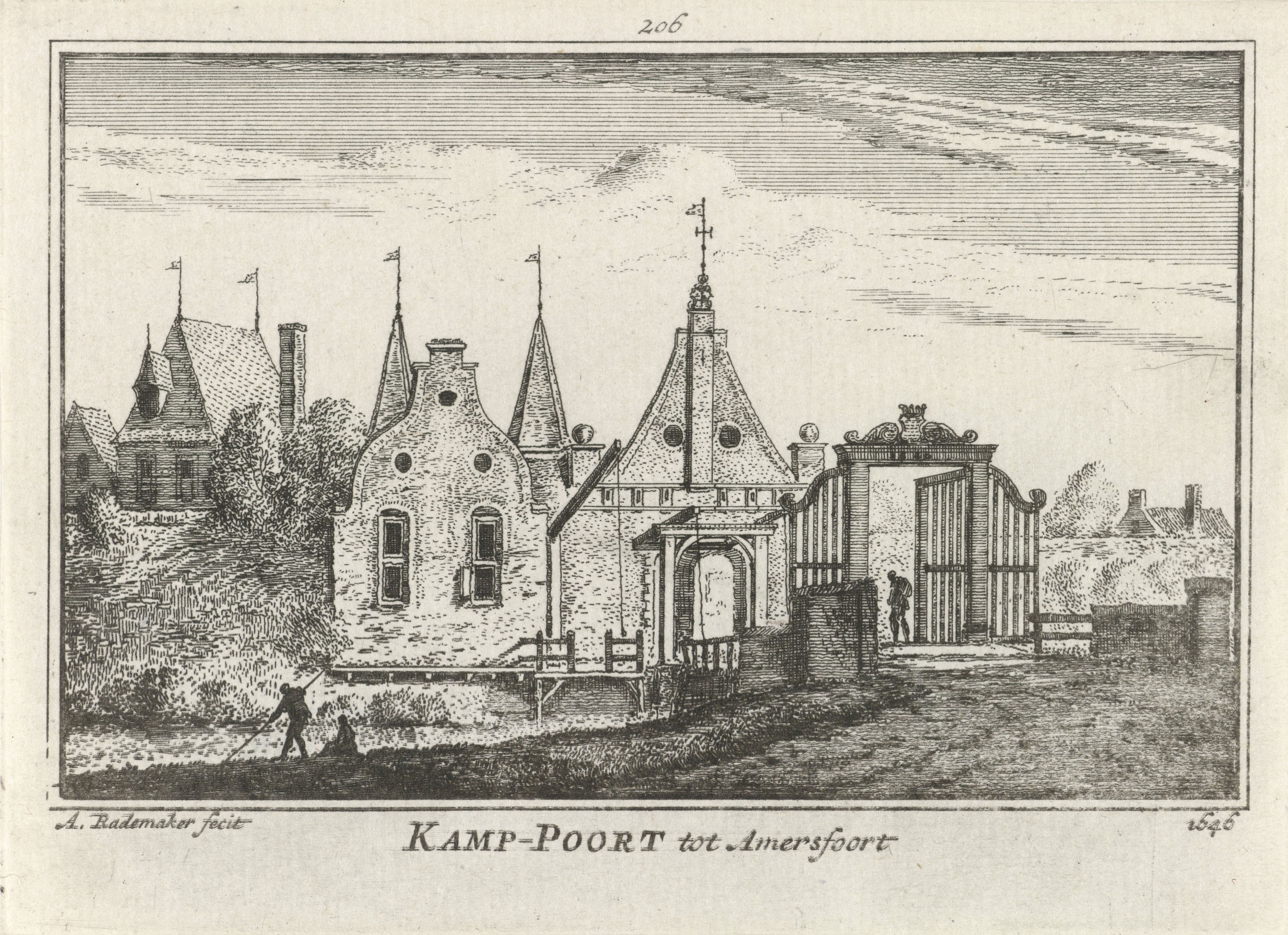 De Kamp-poort of Kamperbuitenpoort aan de oostzijde van de stad Amersfoort